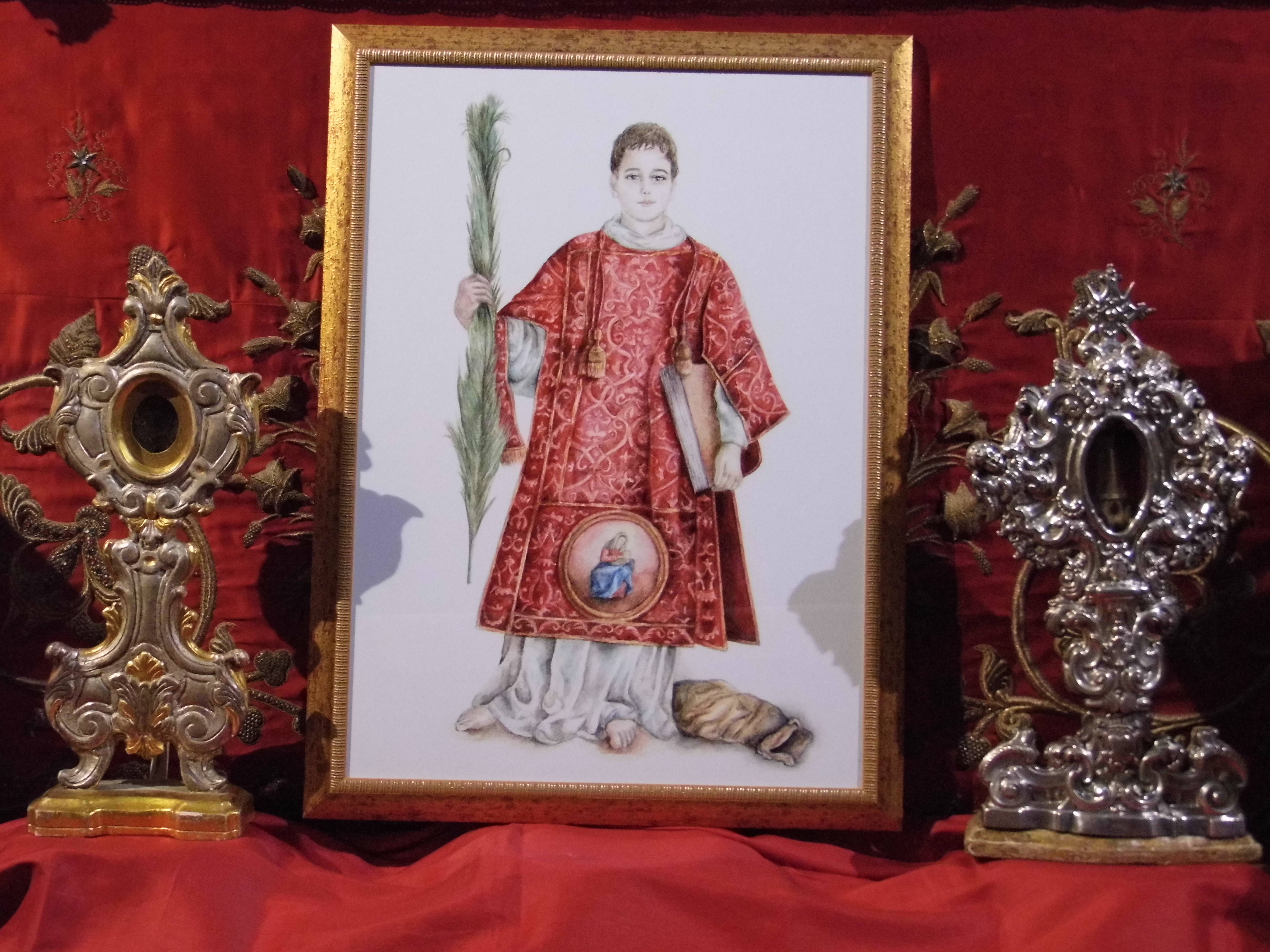 La nuova icona "Caesarius Diaconus" in mezzo al reliquiario argenteo e ligneo di San Cesario diacono e martire, Parrocchia Santa Maria delle Grazie in San Cesario di Lecce